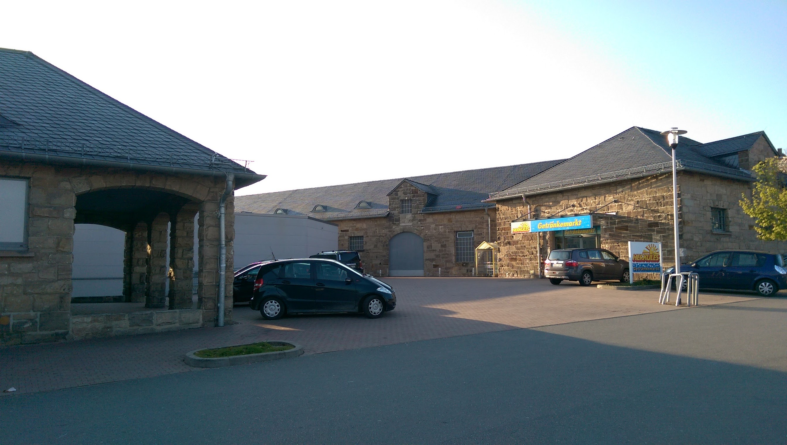 Arobella Therme Arolsen